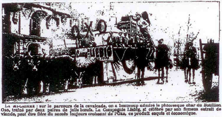 Char du Bouillon Oxo - Mi-Carême 1912